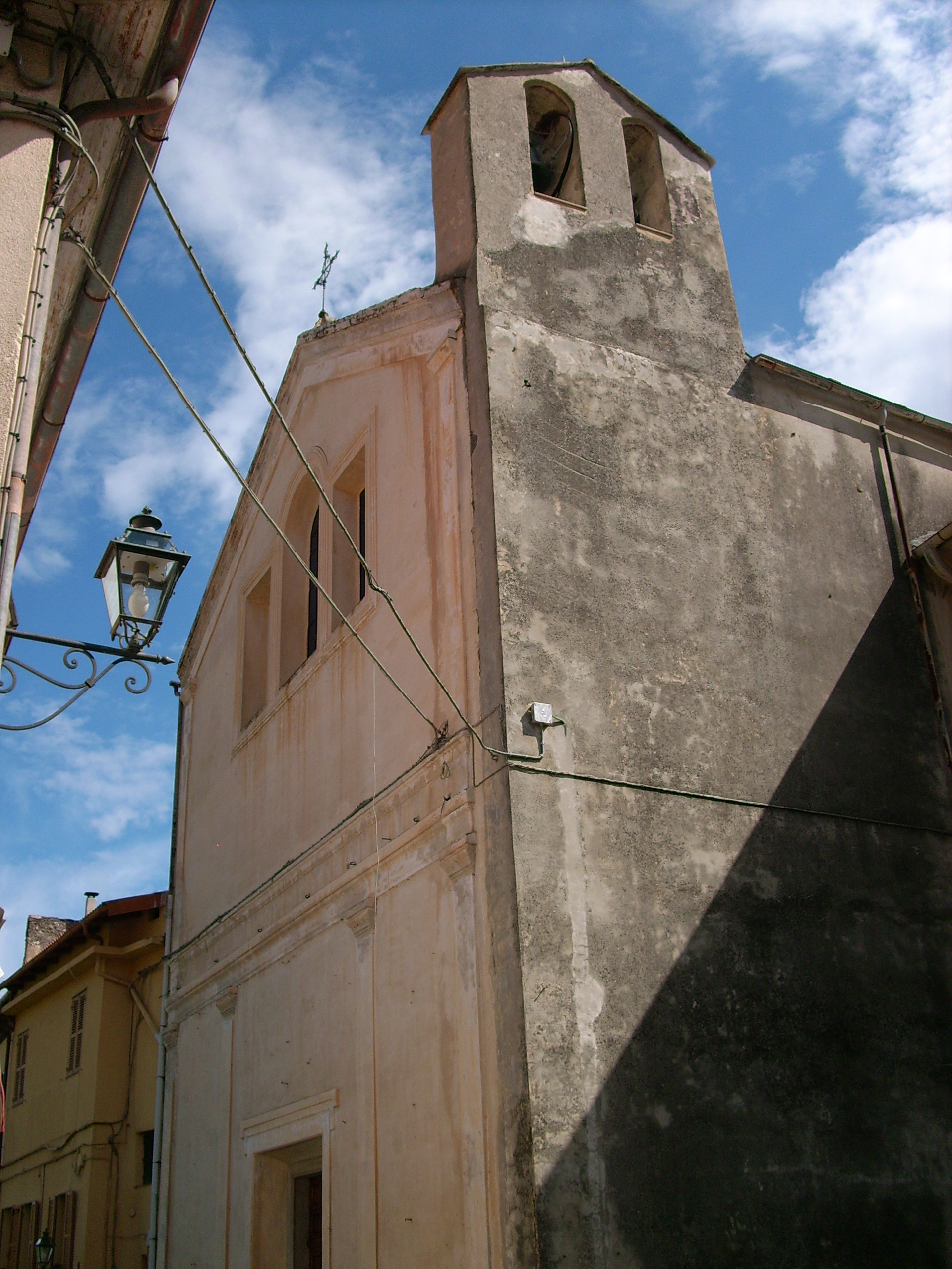 Oratorio della Madonna del Rosario di Toirano, Liguria, Italia